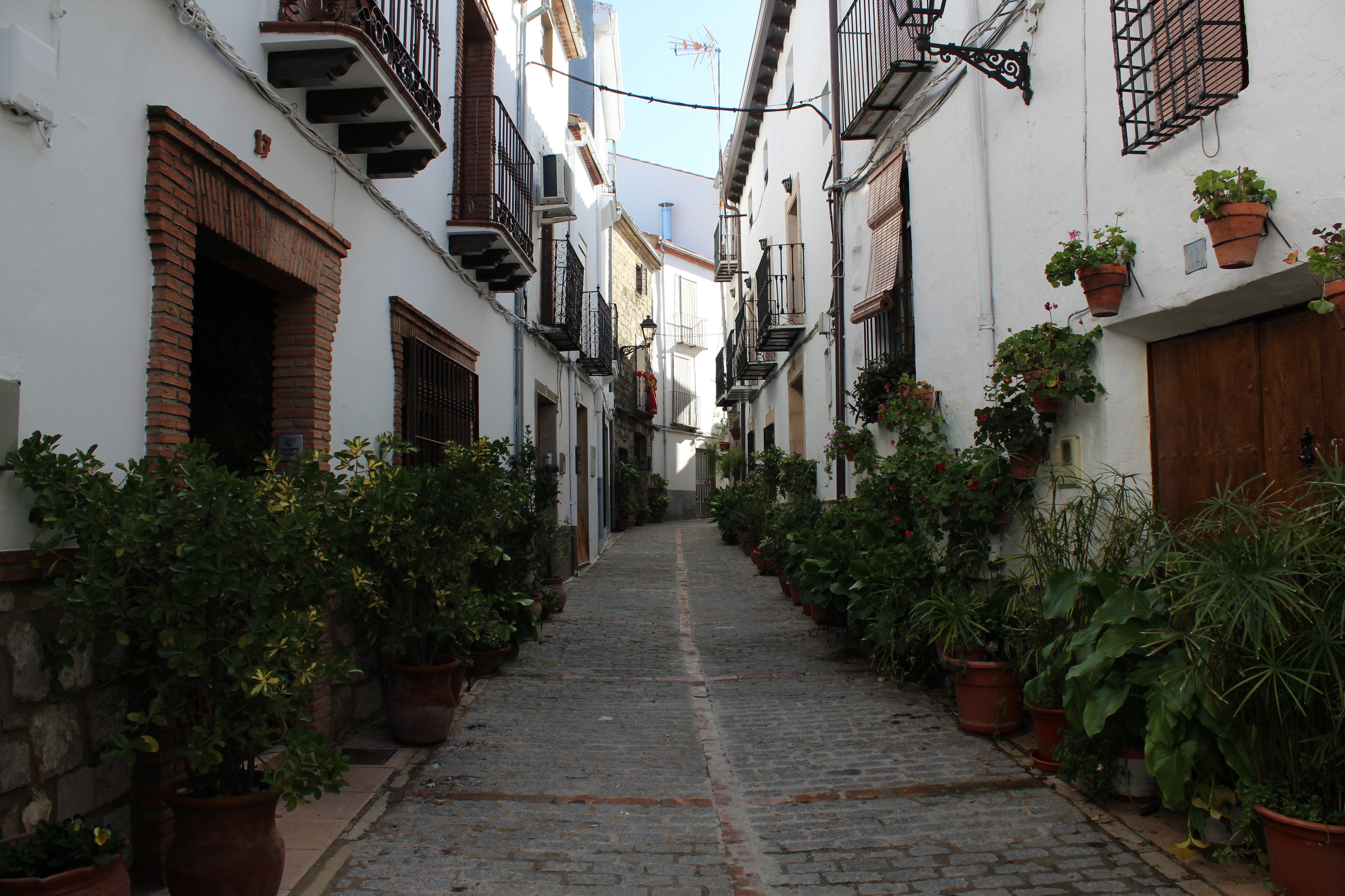 Calle de Iznatoraf poblada de plantas, gracias al cuidado de sus vecinos.